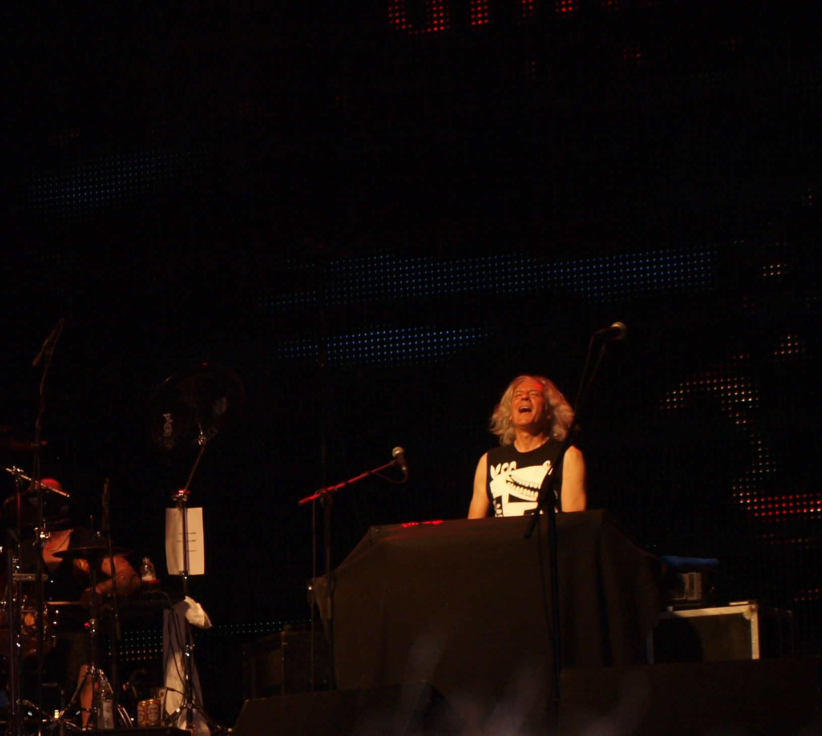 Uriah Heep na Mega Bikers susretima u Slavonskom Brodu, 9. svibnja 2009. godine.